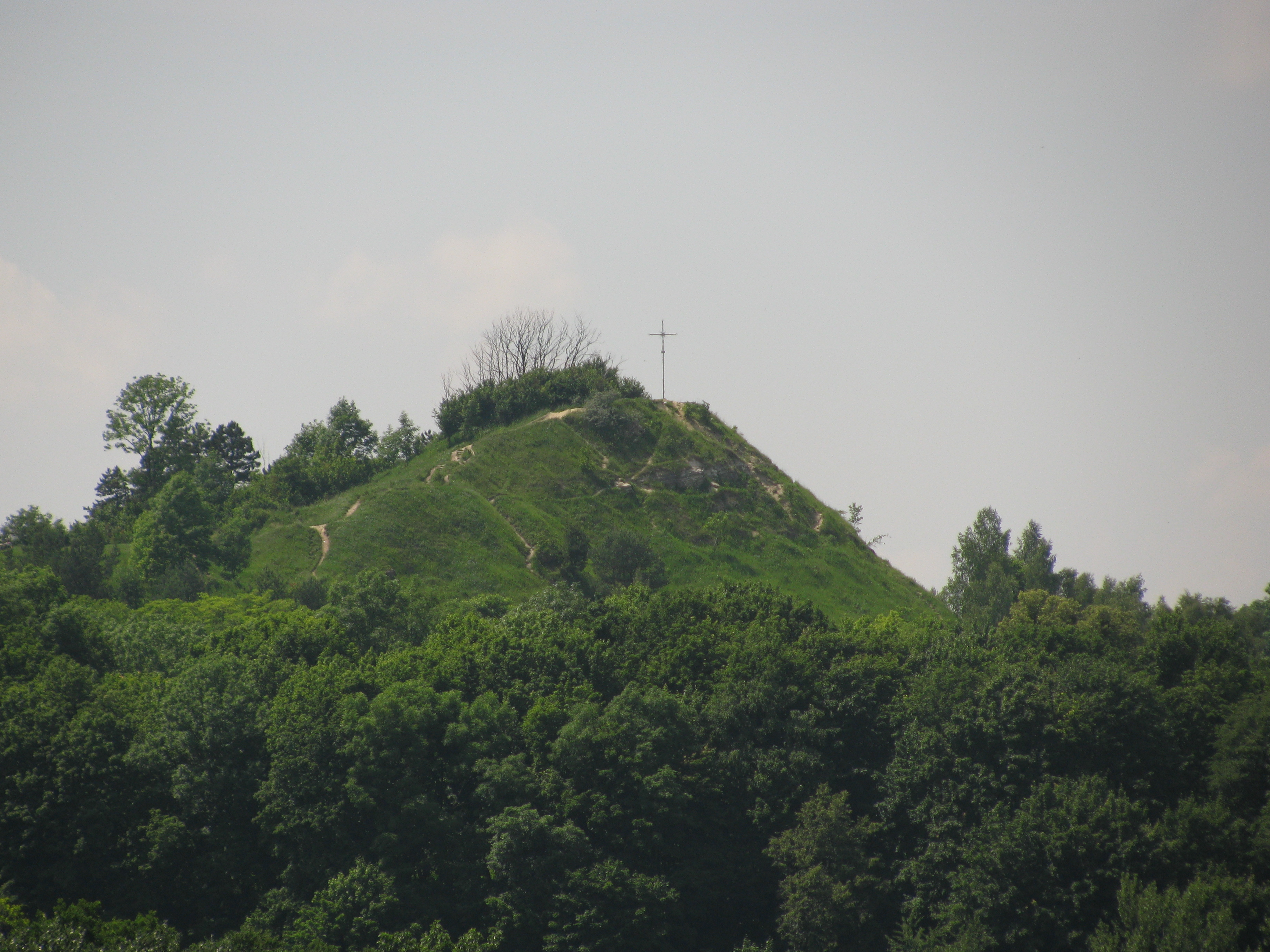 Лиса гора.jpg: Лиса гора. Регіональний ландшафтний парк "Знесіння". Львів